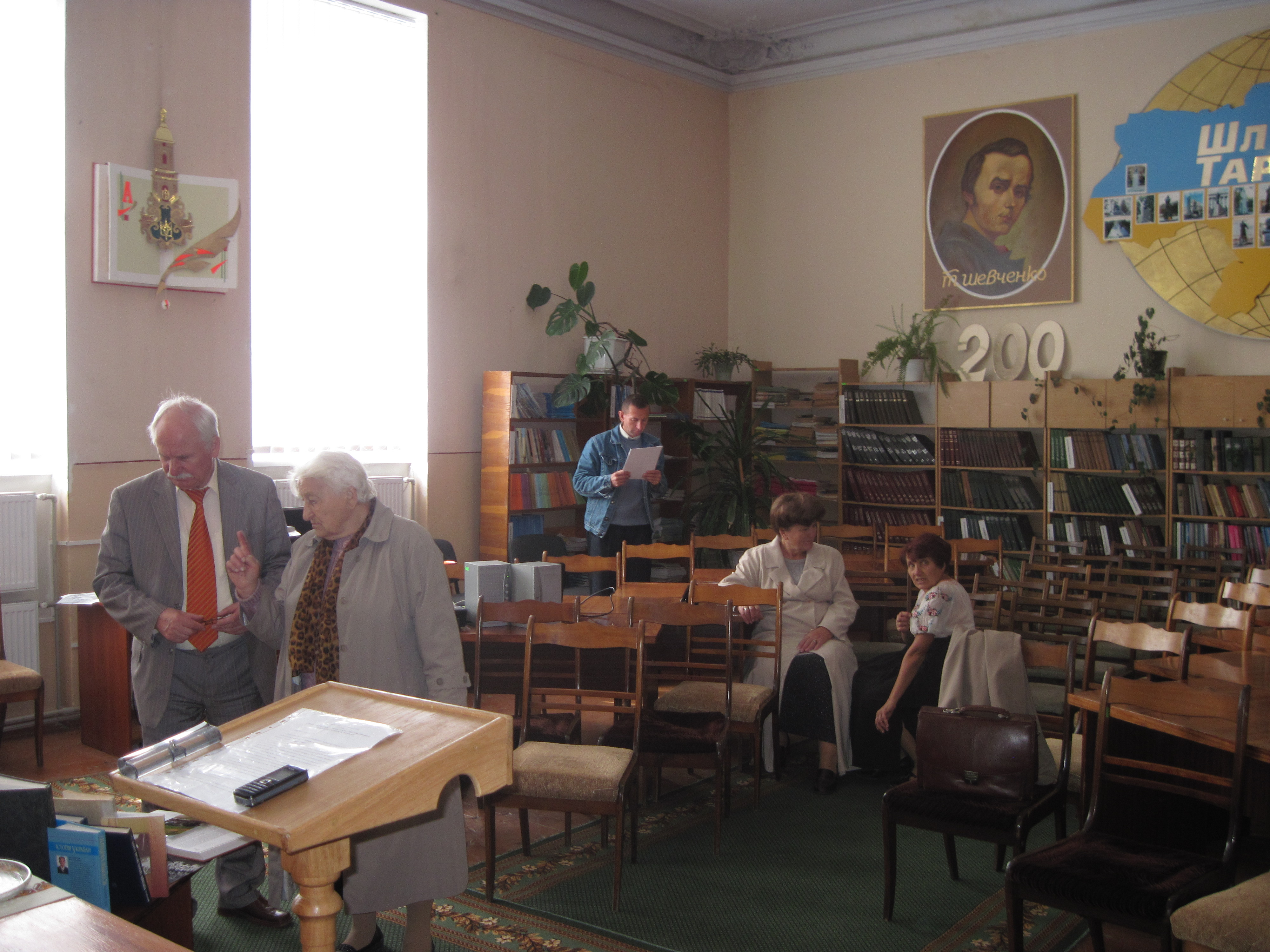 Конференція, Бучач, осінь 2014